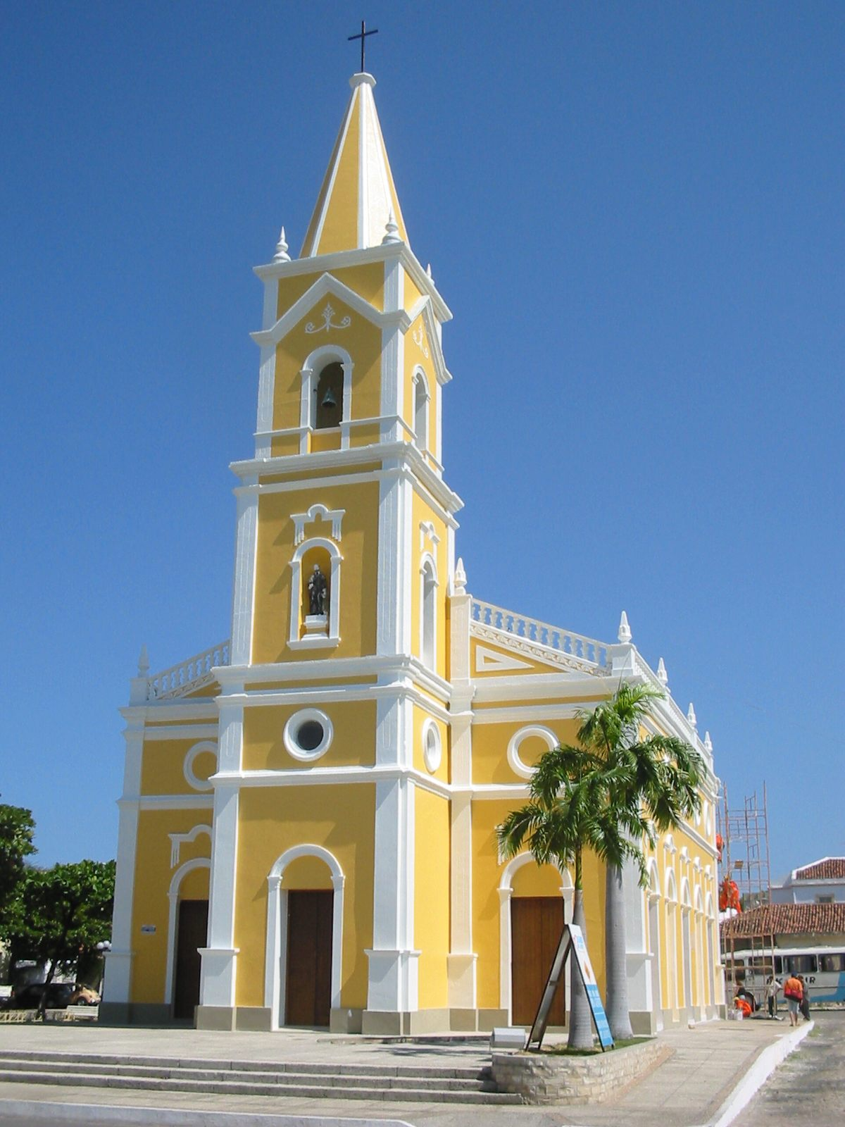 Mossoró (Rio Grande do Norte), Brasil. Igreja de São Vicente. Church of São Vicente. Mossoró (Rio Grande do Norte), Brazil.